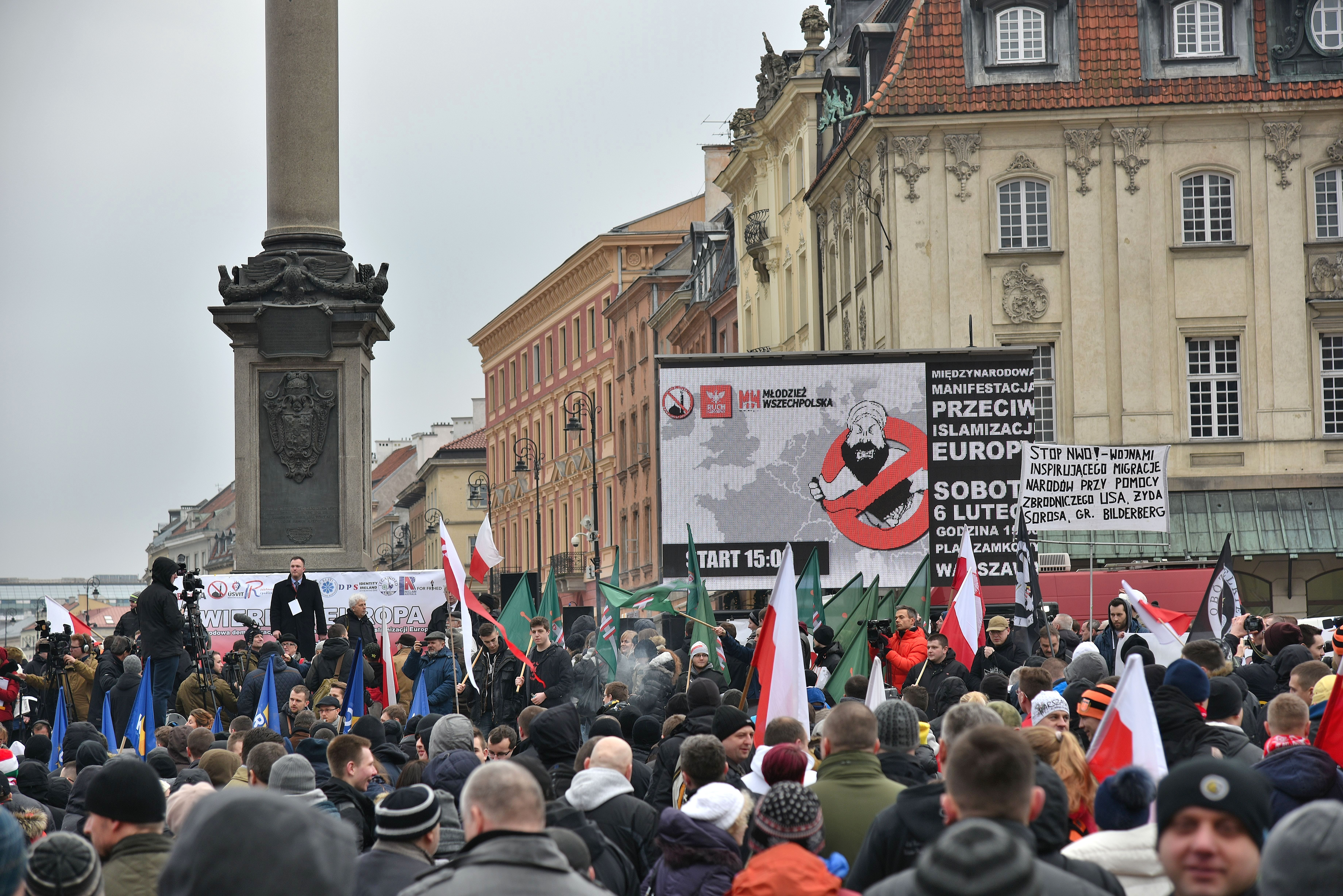 Manifestacja przeciw islamizaji Europy zorganizowana przez Ruch Narodowy i Młodzież Wszechpolską na placu Zamkowym w Warszawie